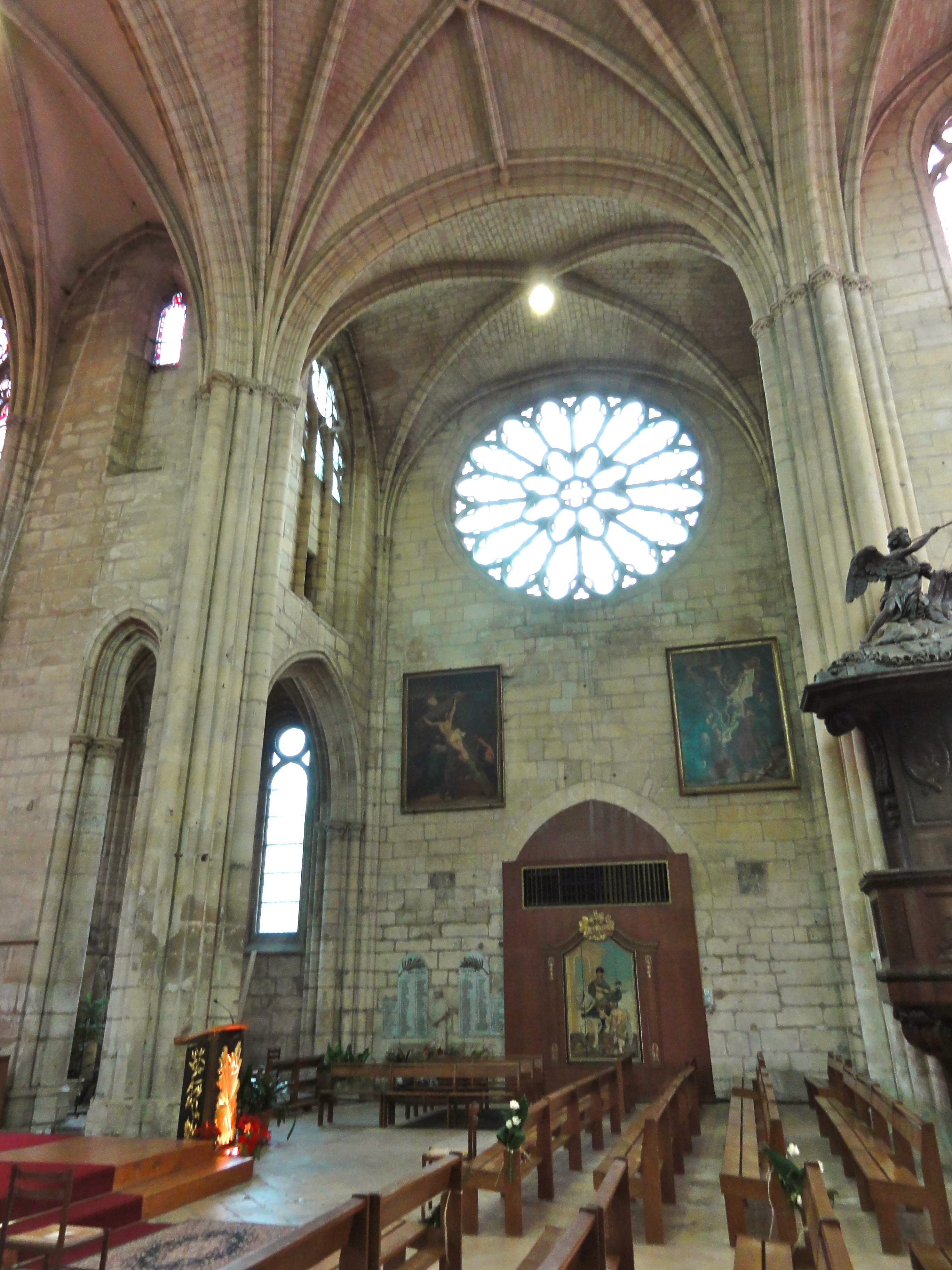 Intérieur de l'Église Notre-Dame de Chambly